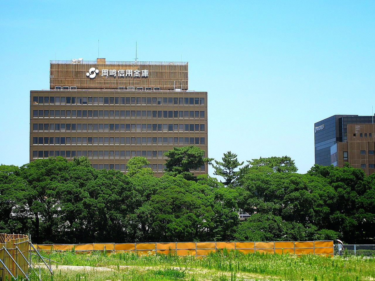 乙川越しに見た岡崎信用金庫本店